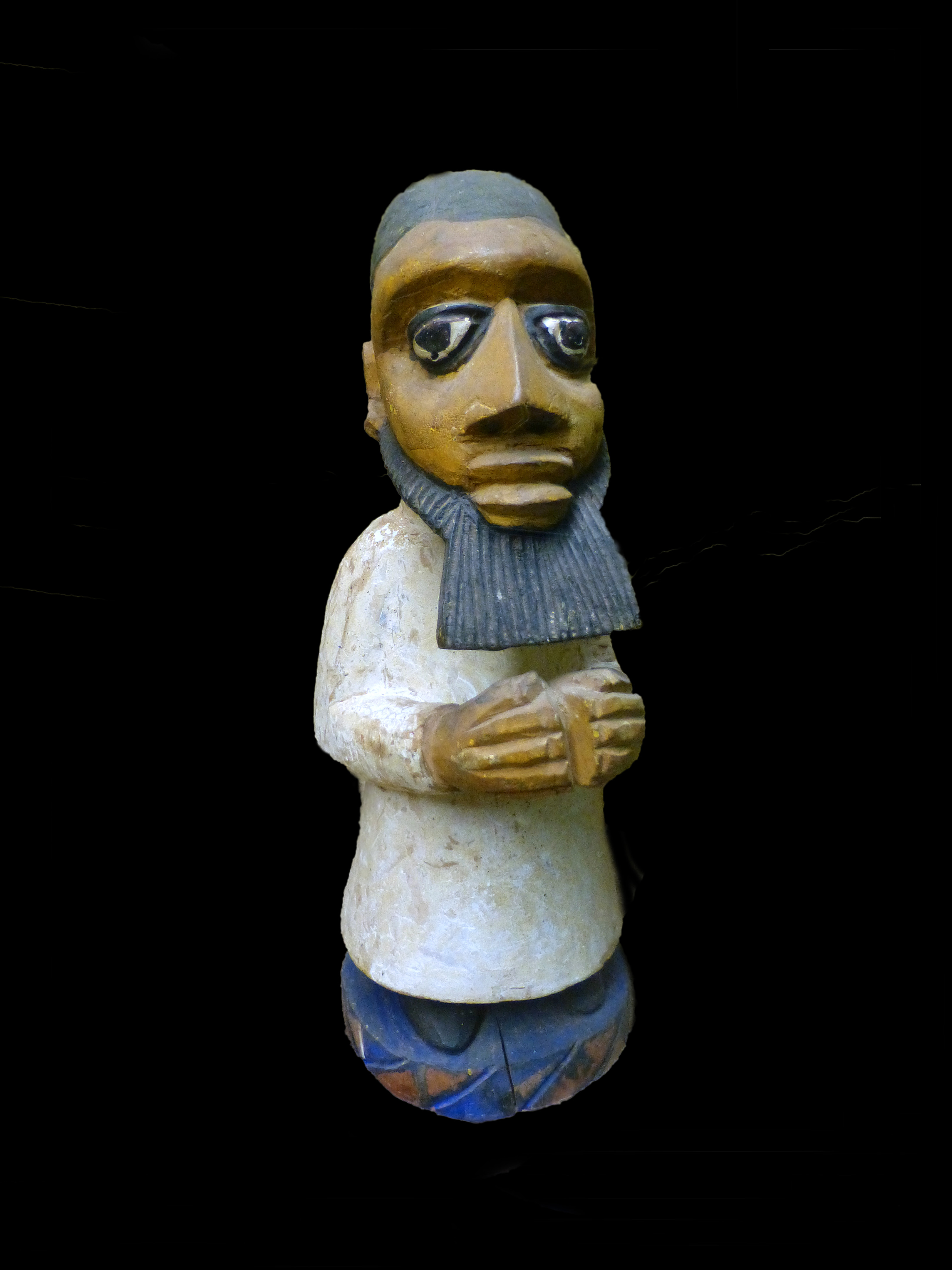 Missionnaire. Sakété. Bénin. 1950. Musée africain de Lyon